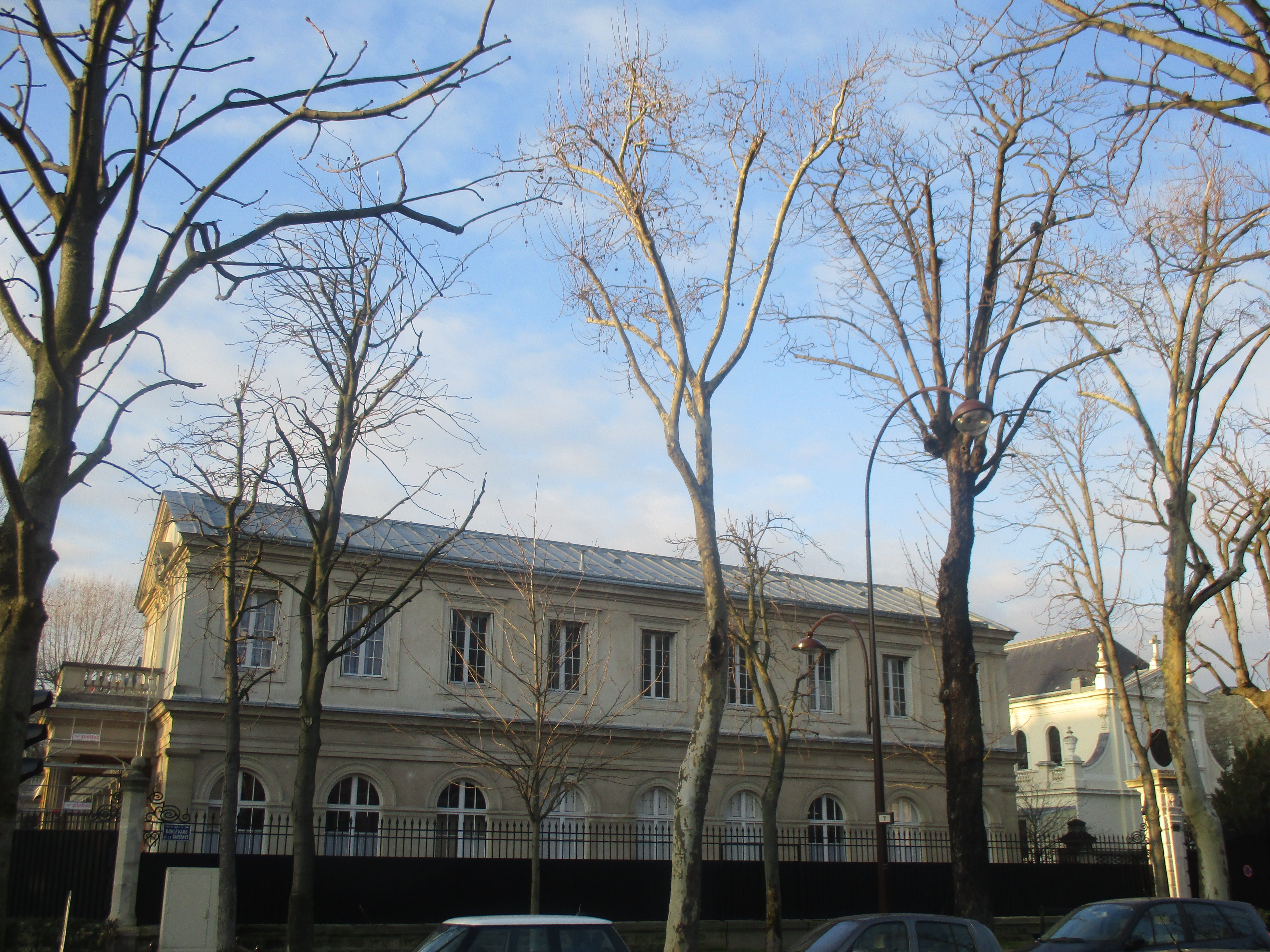 Maison-mère de la Congrégation des Sœurs de Saint-Thomas de Villeneuve, boulevard d'Argenson à Neuilly-sur-Seine.